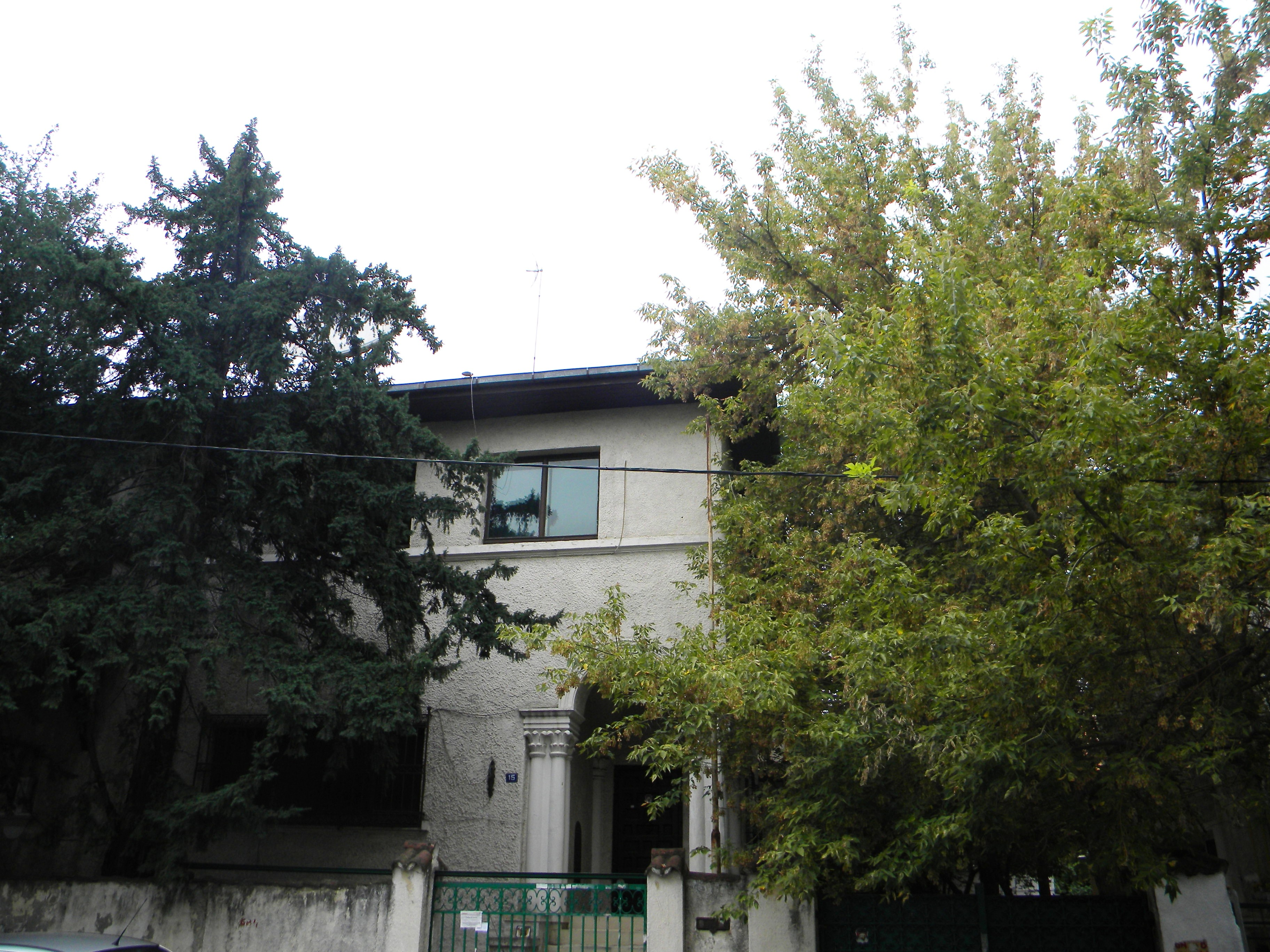 Bucuresti, Romania, Casa pe Str. Emil Pangratti nr. 15, sect. 1, (detaliu 1